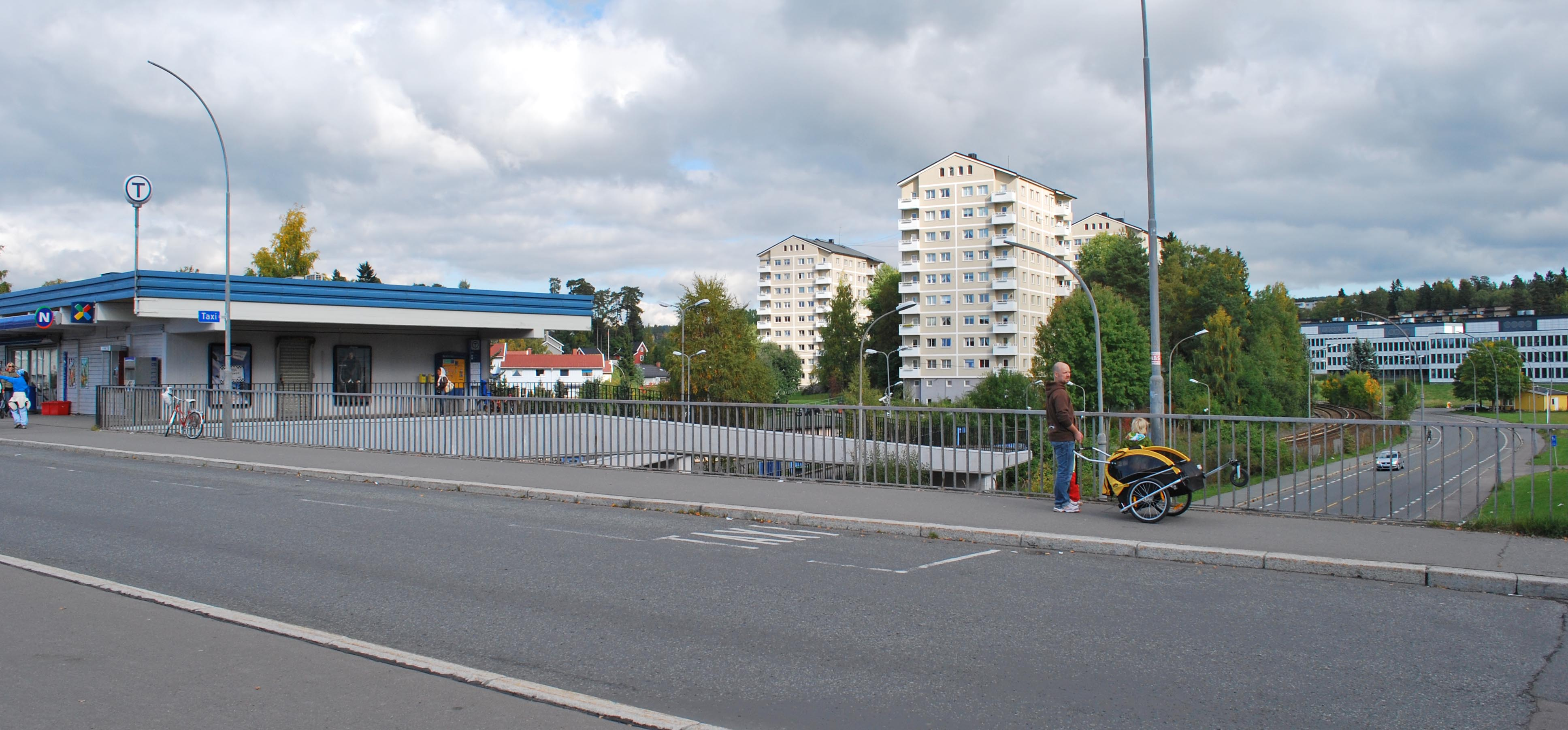 Bøler T banestasjon, Oslo, Utmarksveien nærmest og blokker i Bølerbakken